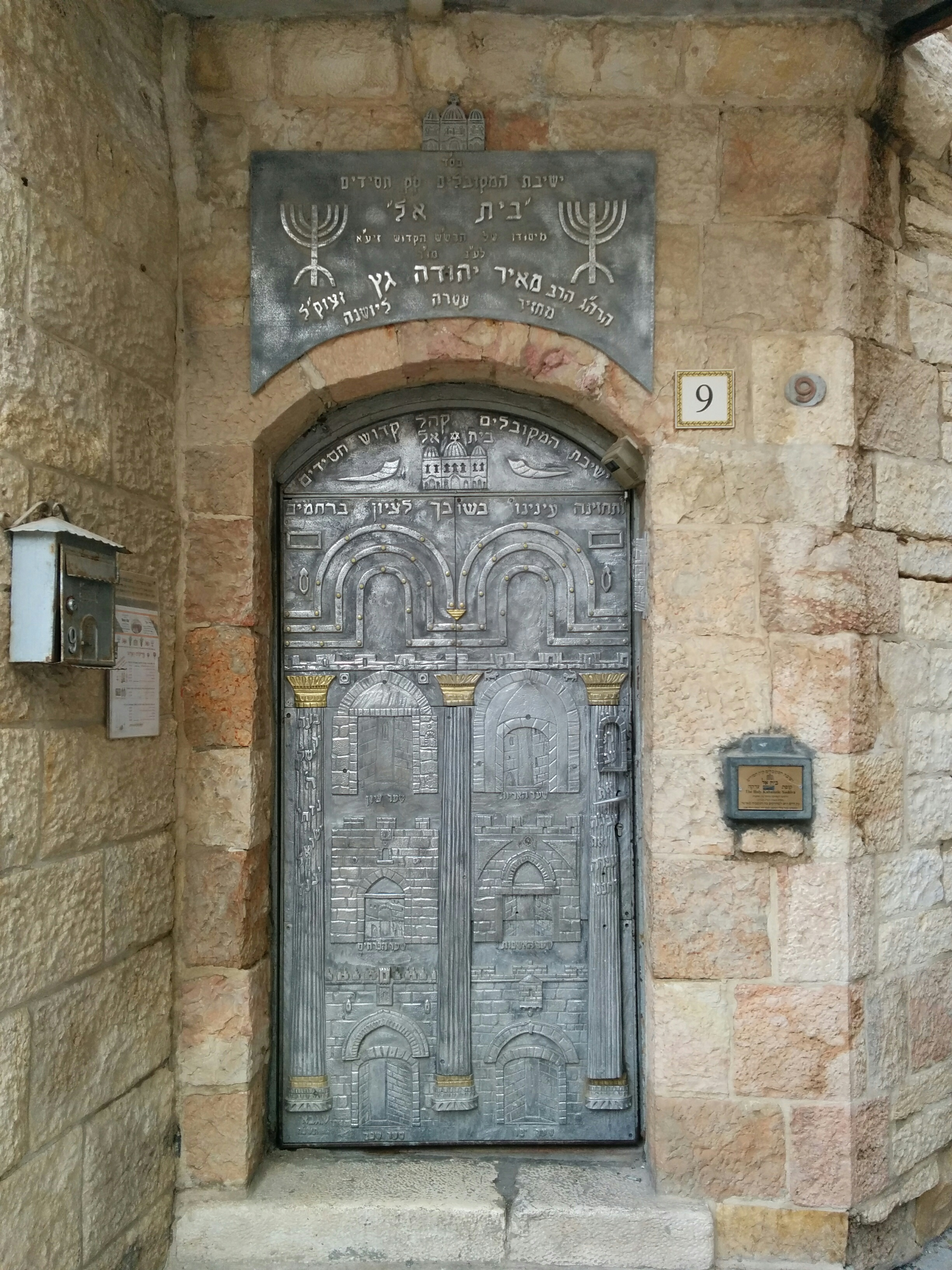 Beit El Synagogue